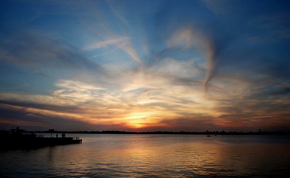 Crepúsculo à beira do Guaíbe, Porto Alegre, Brasil.